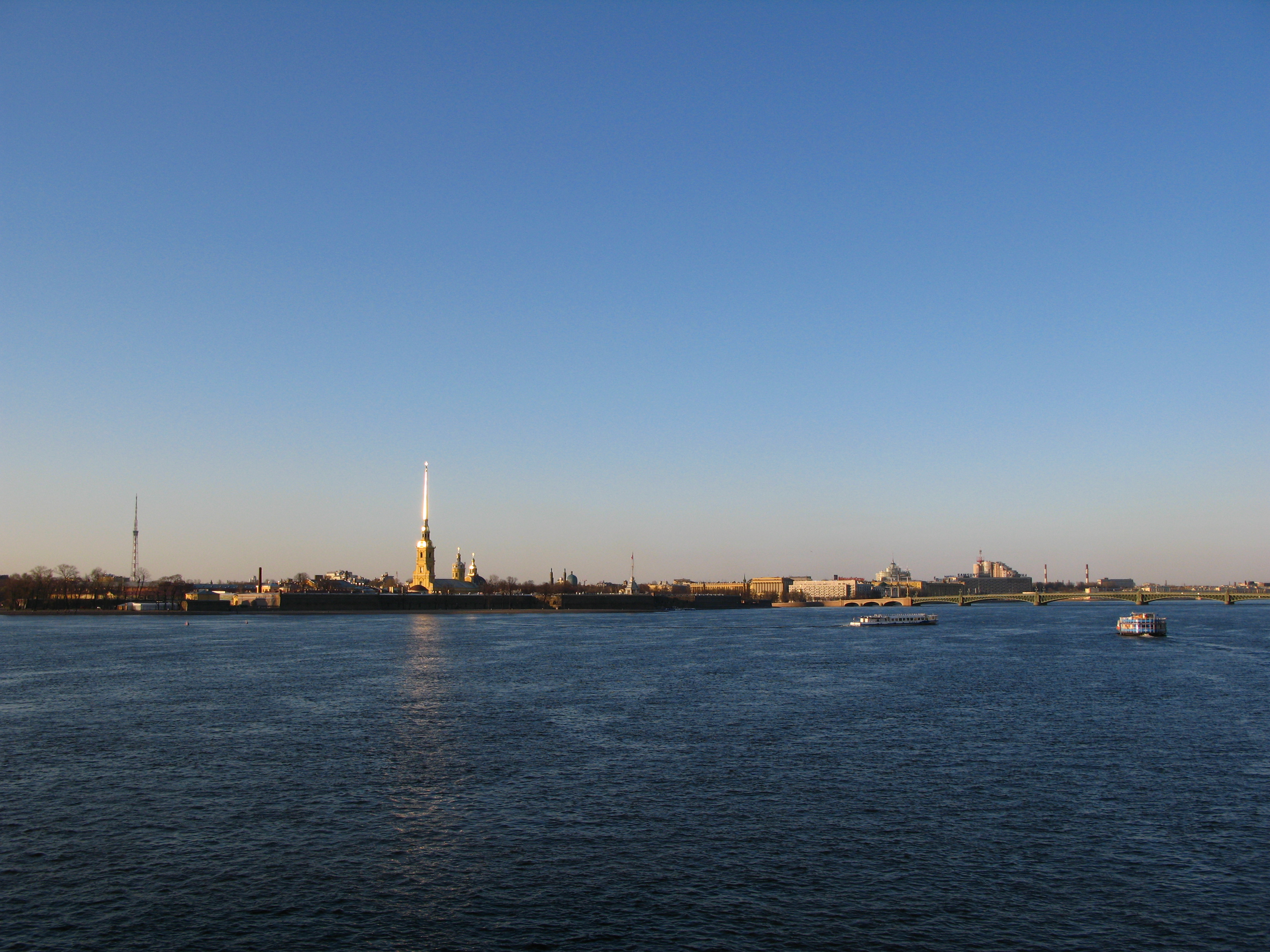 Река Нева и Петрова тврђава. Ст. Петербург.